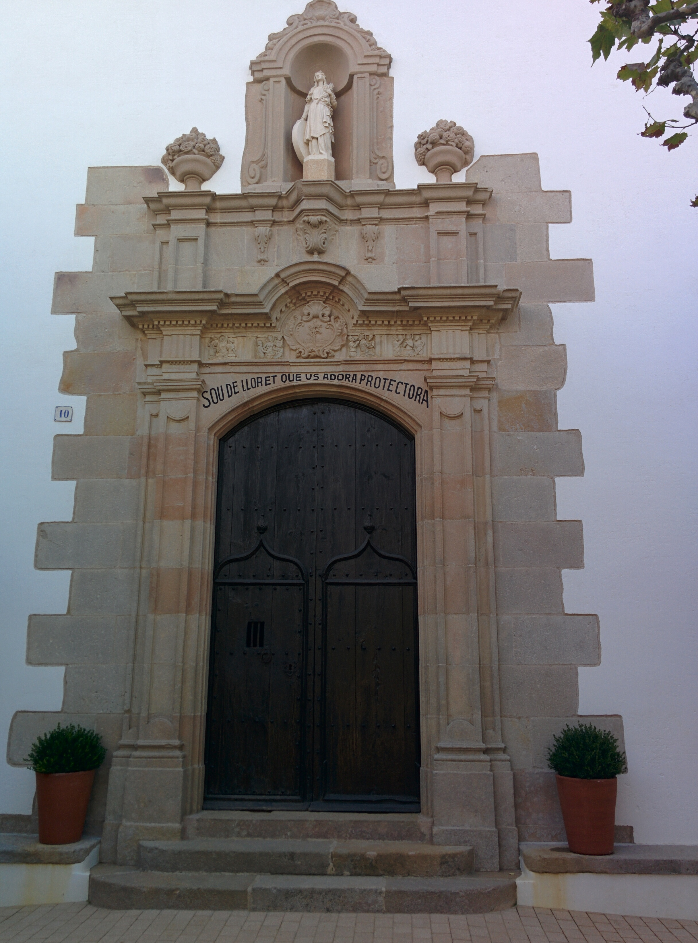 Ermita de Santa Cristina (Lloret de Mar)